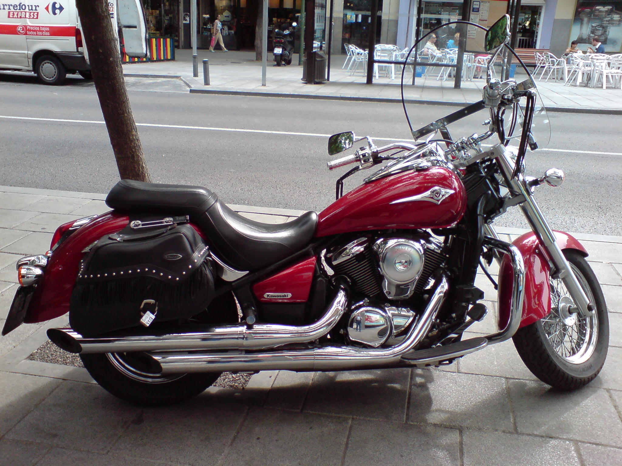 Kawasaki VN900 Classic